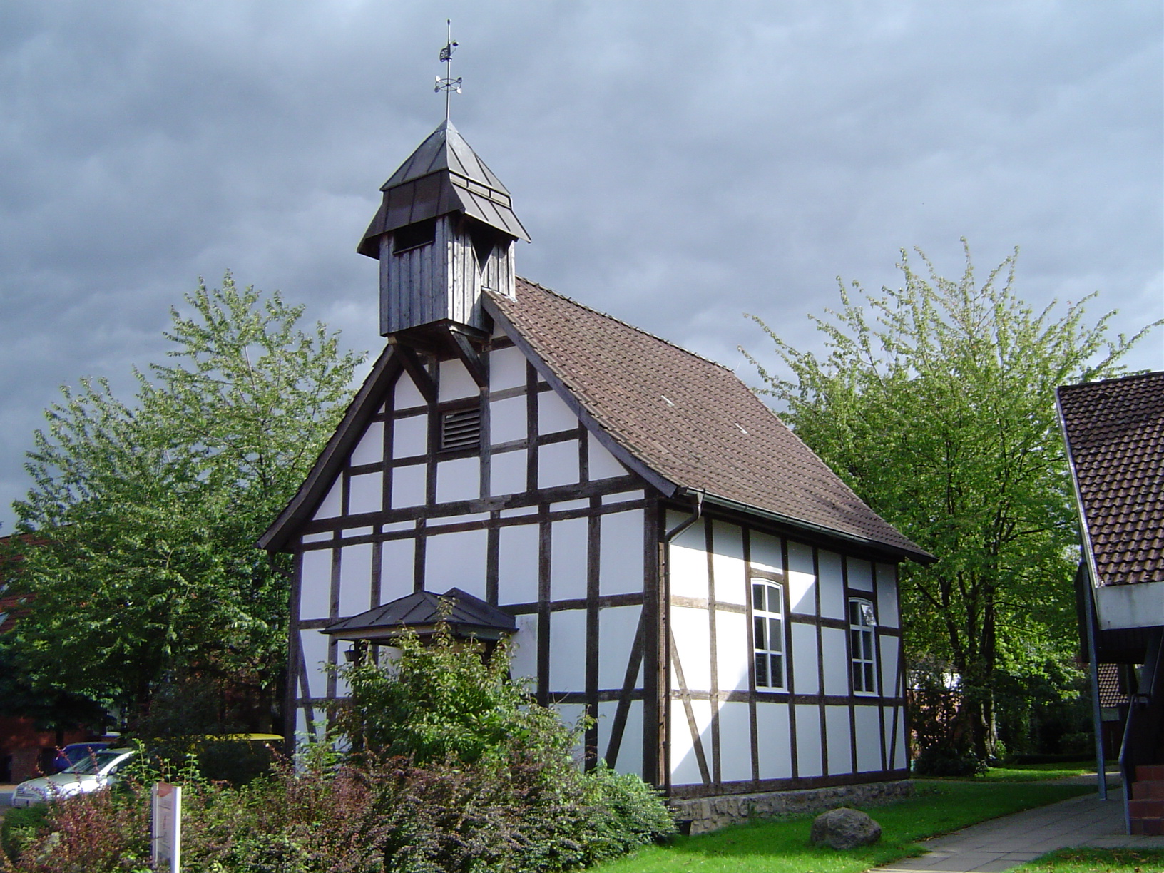 Hannover Davenstedt Altes Dorf Fachwerkkapelle Bild 2